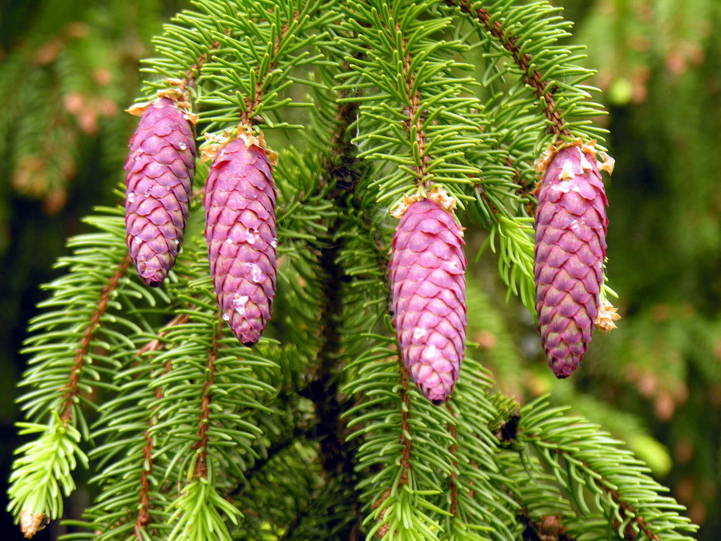 Žemaitėška: Eglės konkuoriežē, 2006 m. birželė 10 d.